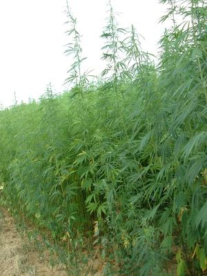 culture de chanvre à fibre